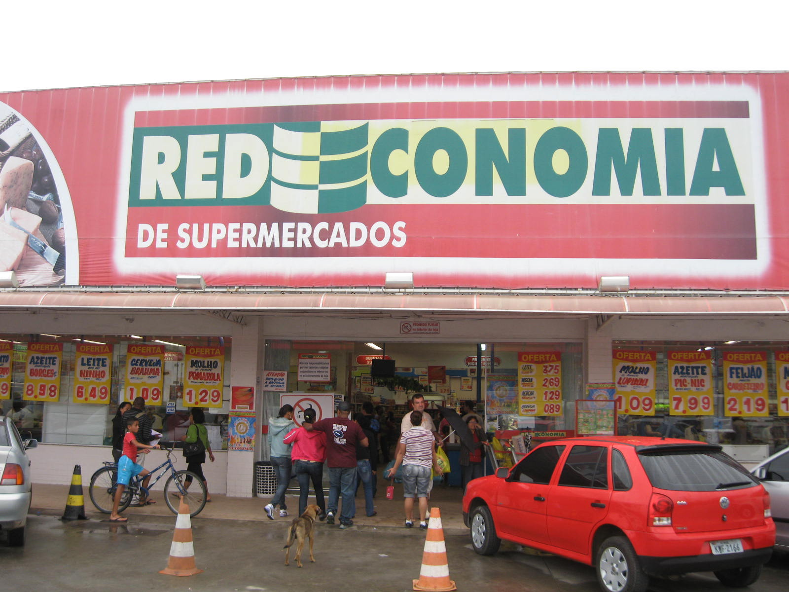 Redeconomia de Magé.